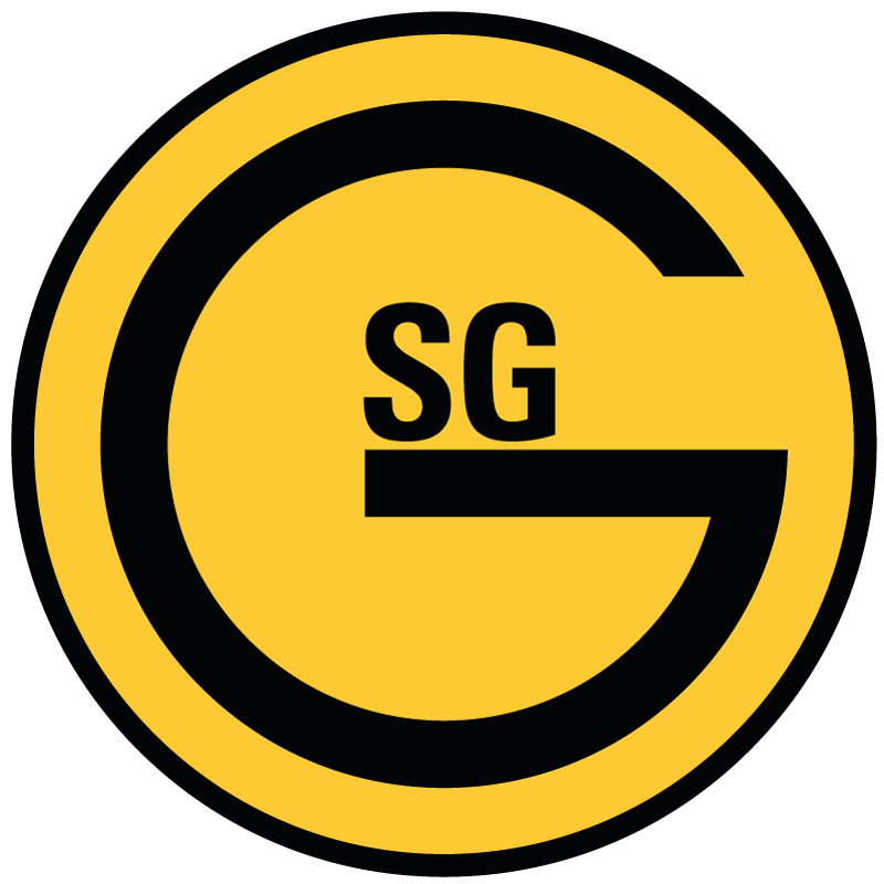 Logo SG Gittersee e.V.